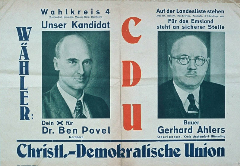 Wähler: Wahlkreis 4 ...Unser Kandidat ... Auf der Landesliste stehen ... Für das Emsland steht an sicherer Stelle ... Abbildung: Porträtfotos Plakatart: Kandidaten-/Personenplakat mit Porträt Drucker_Druckart_Druckort: Druck Gebr. Pagenkämper, Osnabrück Objekt-Signatur: 10-001: 120 Bestand: Plakate zu Bundestagswahlen (10-001) GliederungBestand10-18: Plakate zu Bundestagswahlen (10-001) » Die 1. Bundestagswahl am 14. August 1949 » CDU » Mit Porträtfoto Lizenz: KAS/ACDP 10-001: 120 CC-BY-SA 3.0 DE